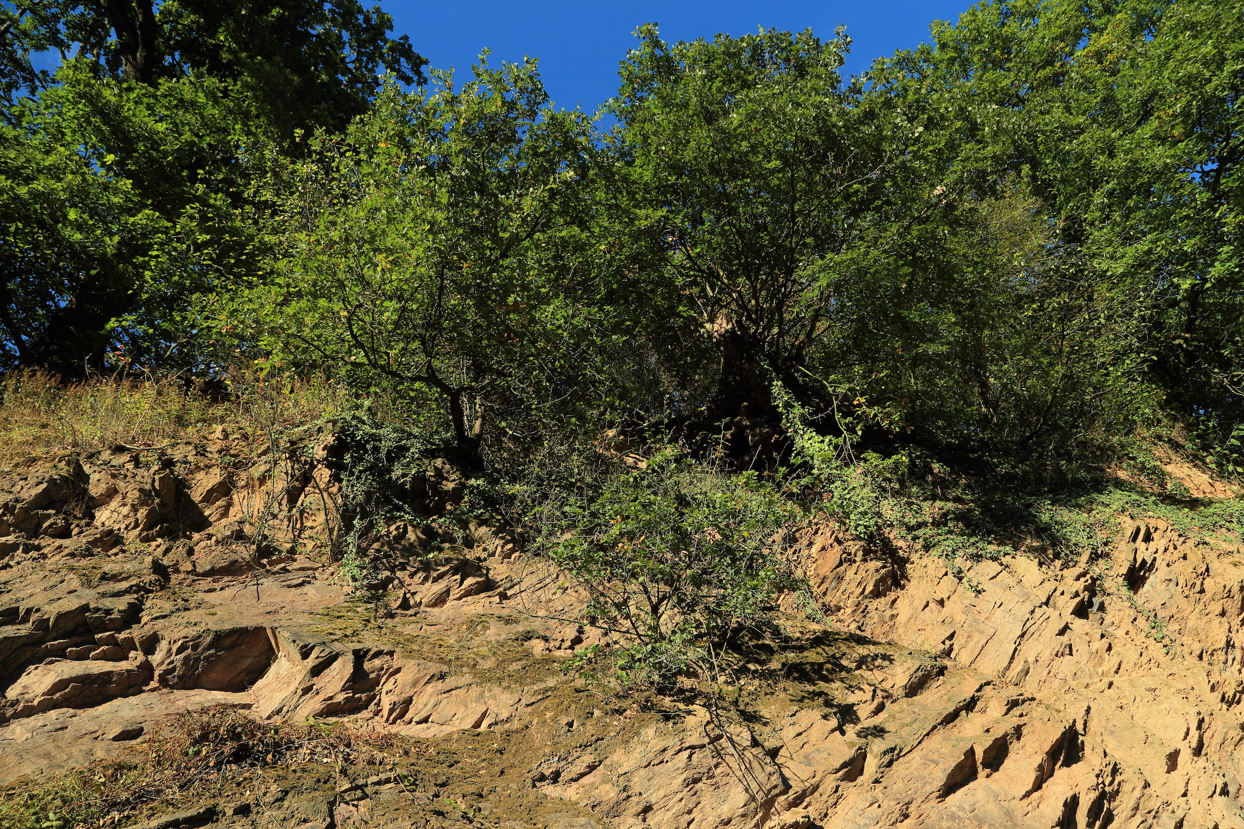 Geotop-Nummer: 671A019 5820GT000001 Alzenau i.UFr. Aschaffenburg 5820 Langenselbold R: 4294264 H: 5555441 150 m ü.NN L: 30 m, B: 10 m, H: 10 m, F: 300 qm Vorspessart